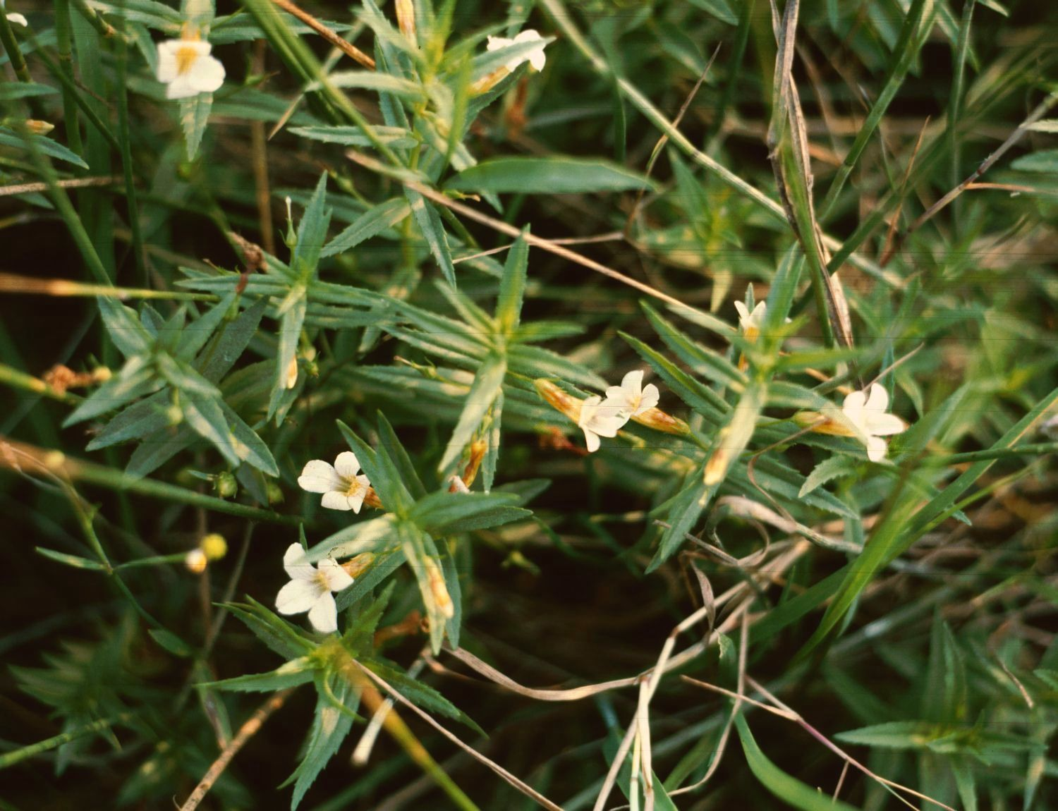 Gnadenkraut (Gratiola officinalis), Wegerichgewächse (Plantaginaceae) - Rumänien/România: Oltenien, Balta SW Baia de Aramă